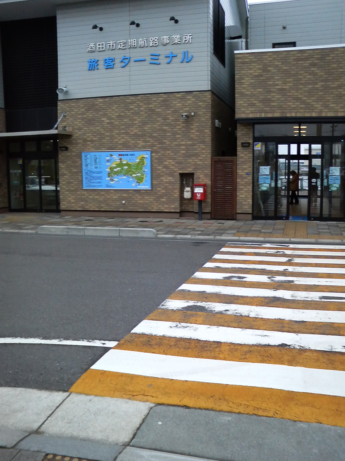 酒田市定期航路事業所旅客ターミナル(山形県酒田市船場町2-5-6)